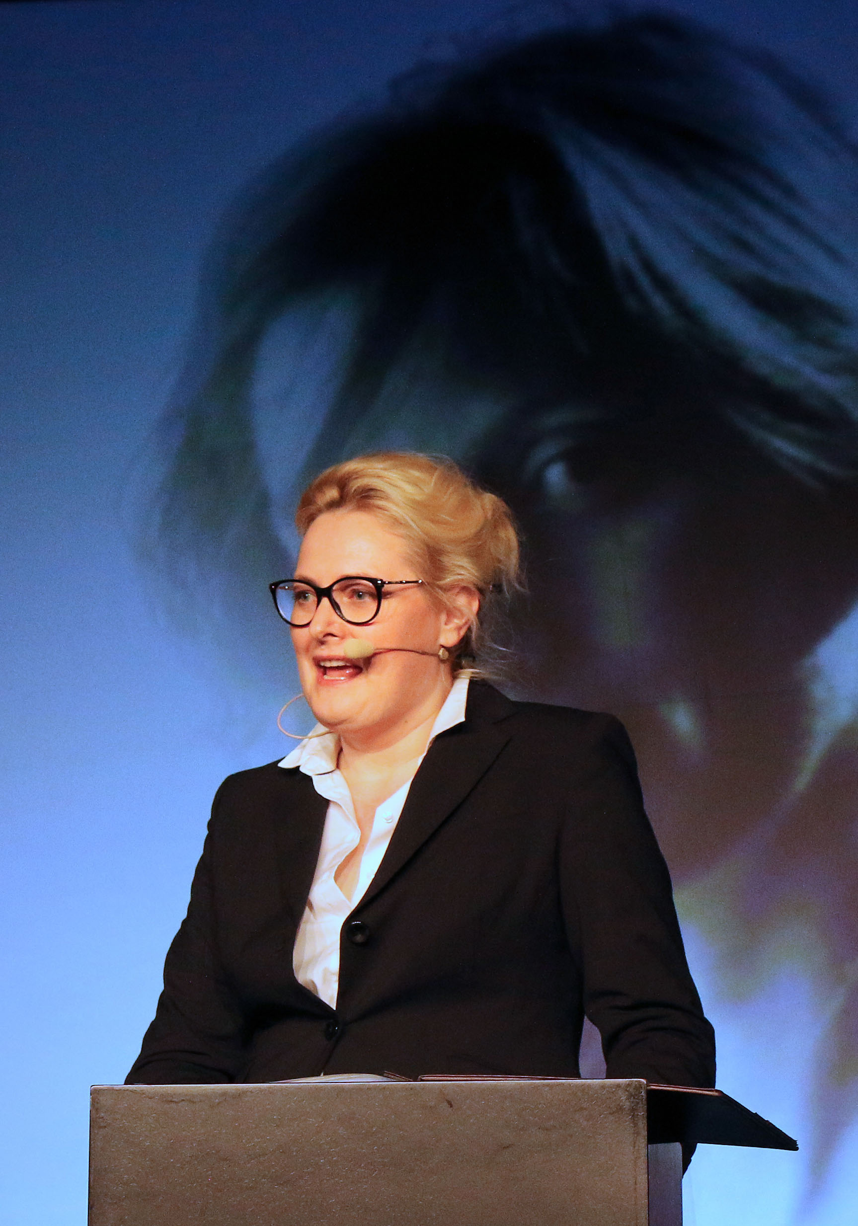 Die Literaturwissenschaftlerin Dr. Claudia Maria Pecher 2019 als Laudatorin bei der Verleihung des Korbinian – Paul-Maar-Preises der Deutschen Akademie für Kinder- und Jugendliteratur, deren Präsidentin sie ist.